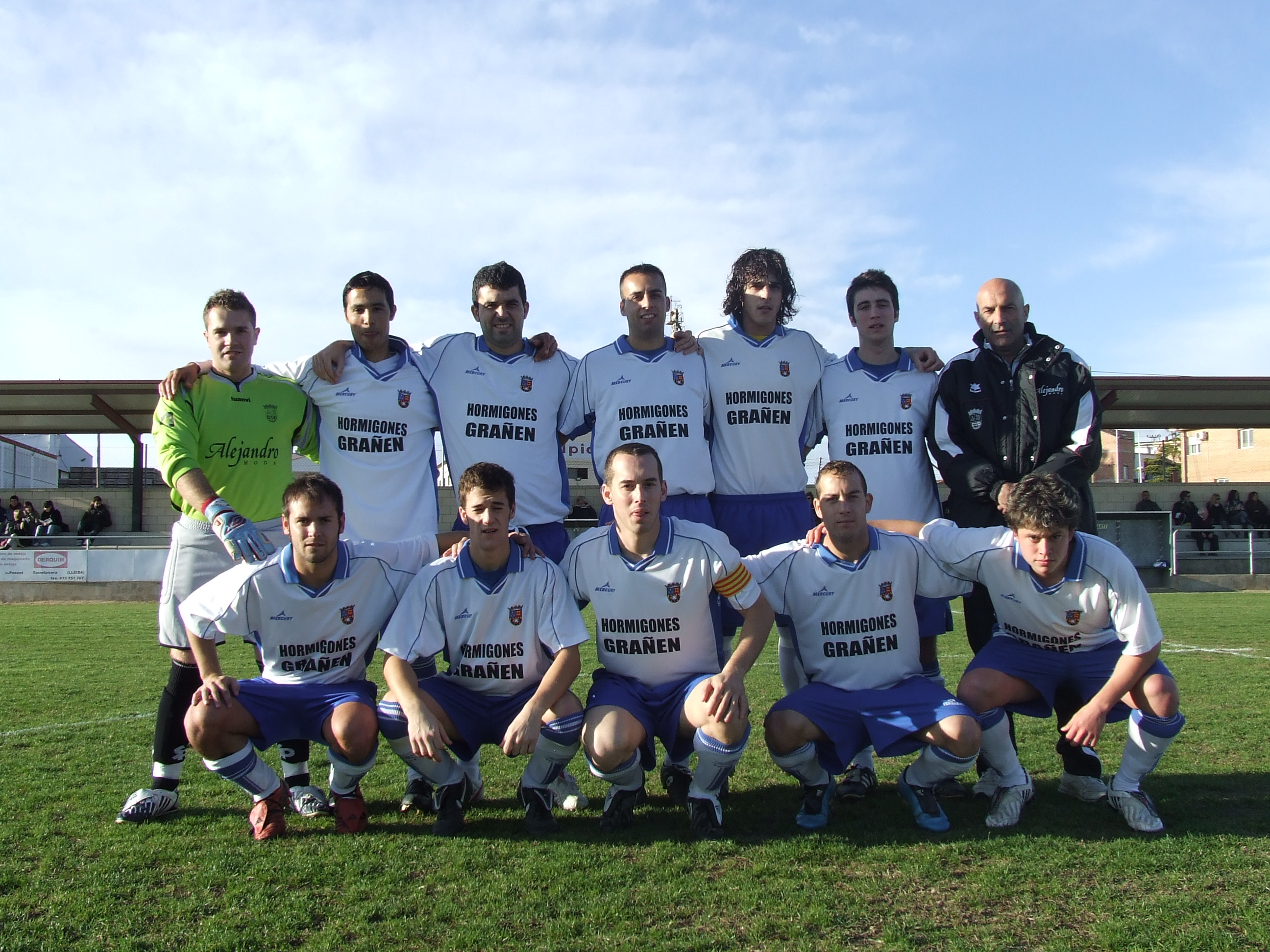 Altorricón 2 - Grañén 1 (08.11.2009)